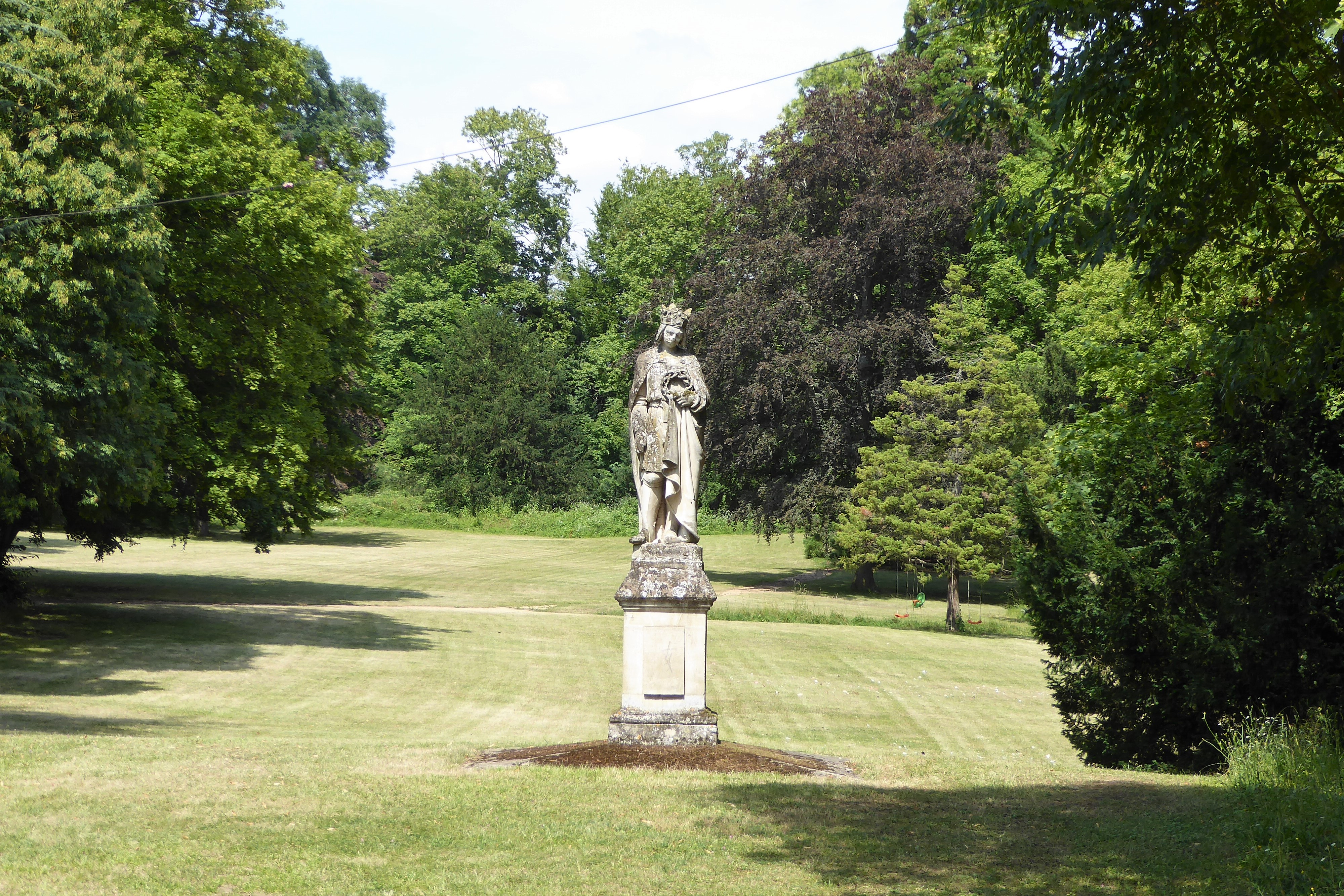 Statue de saint Louis dans le parc du château de Dreux, Eure-et-Loir, France.